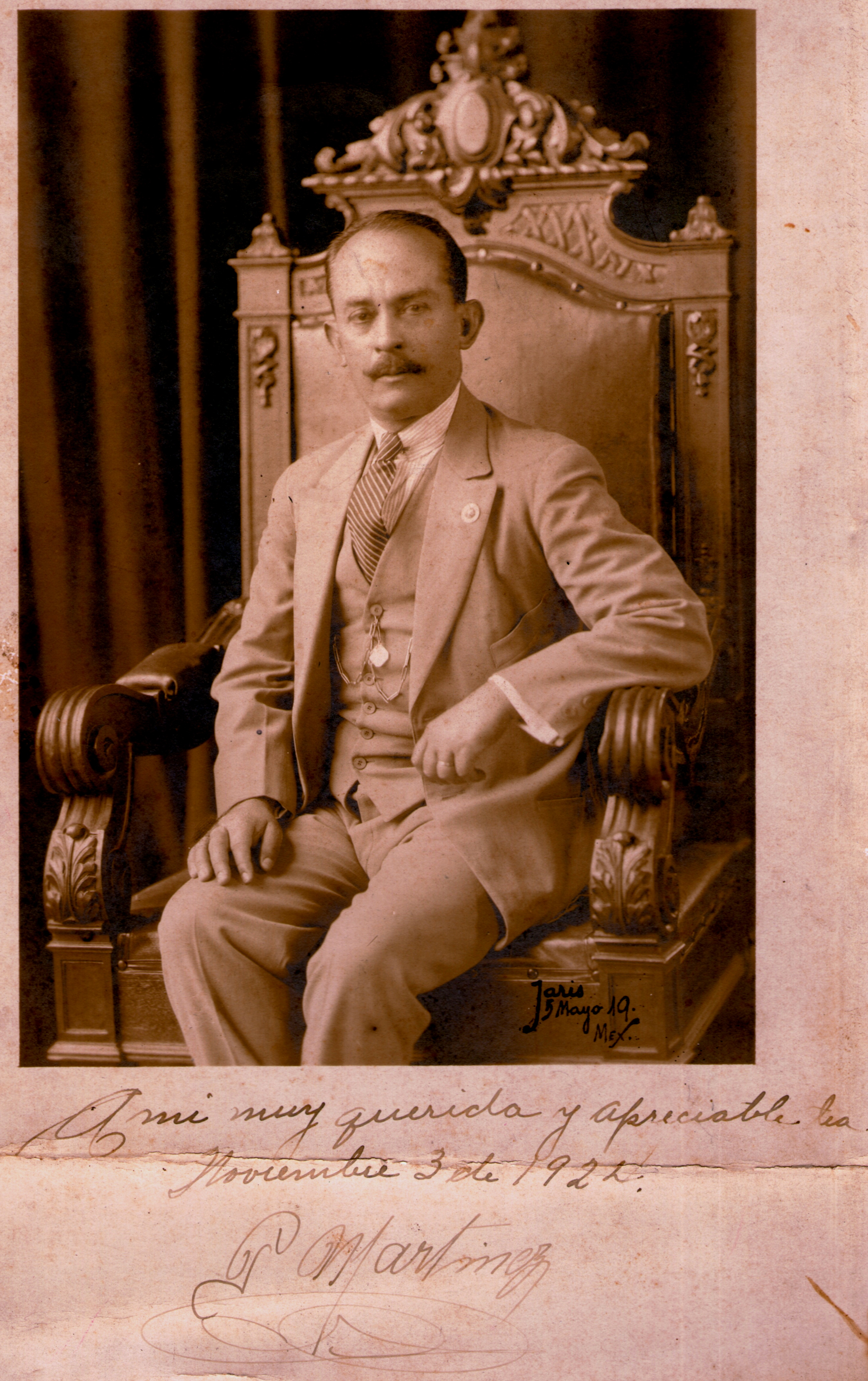 GENERAL DE DIVICION ZAPATISTA DEL SUR